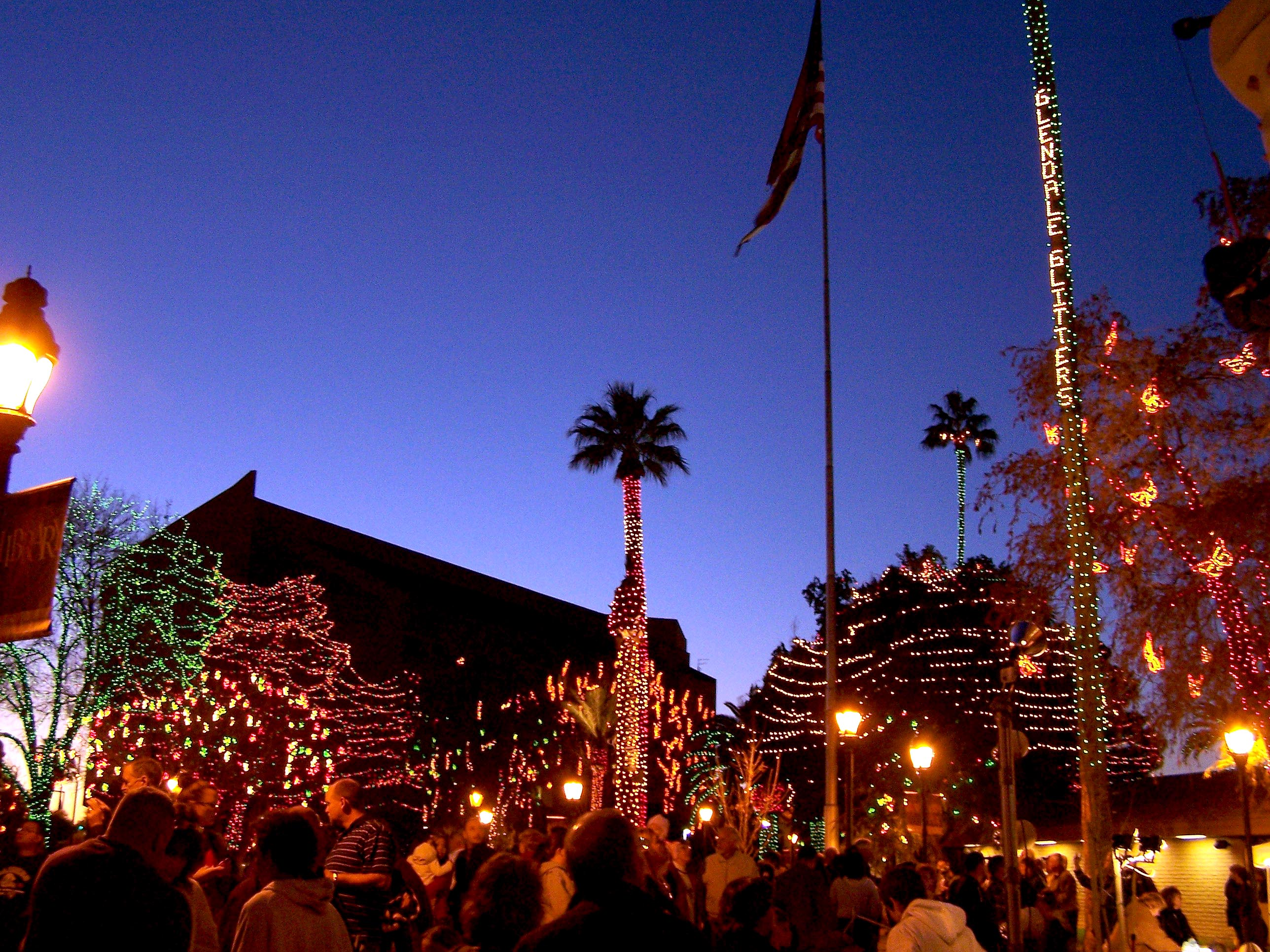 Glendale city hall during Glendale Glitters